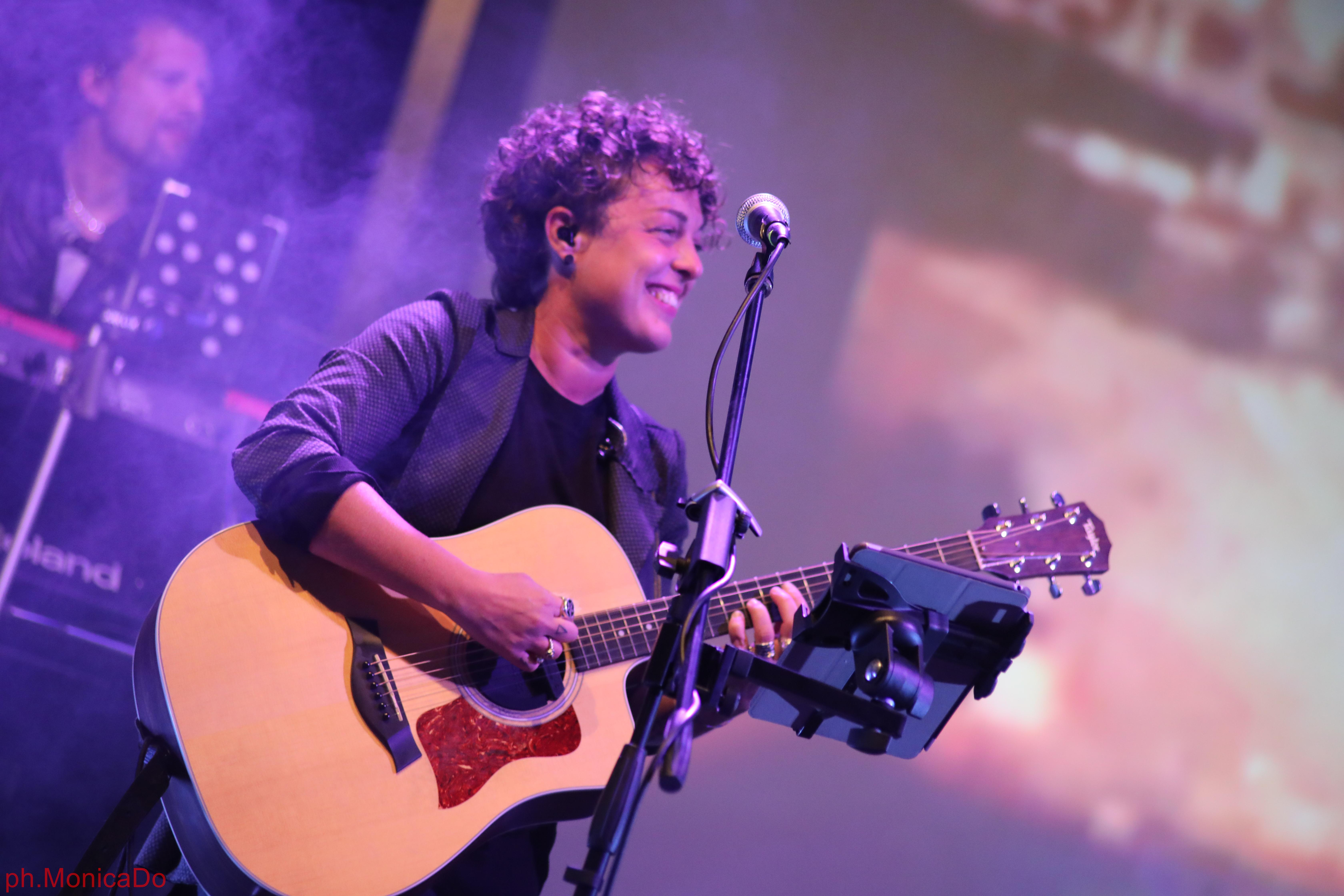 Diana on stage